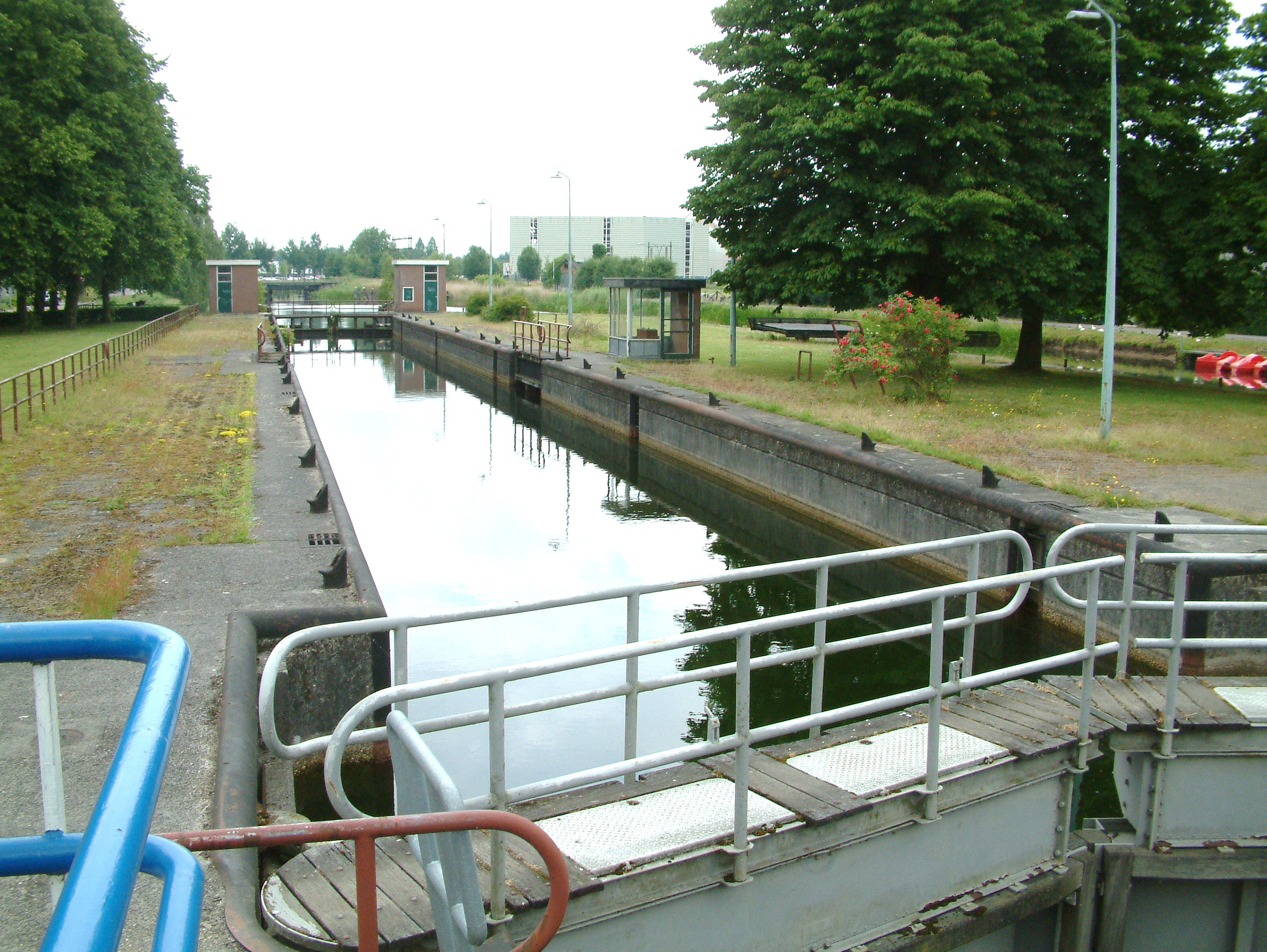 Sluis in het Apeldoorns kanaal van Dieren naar Hattem